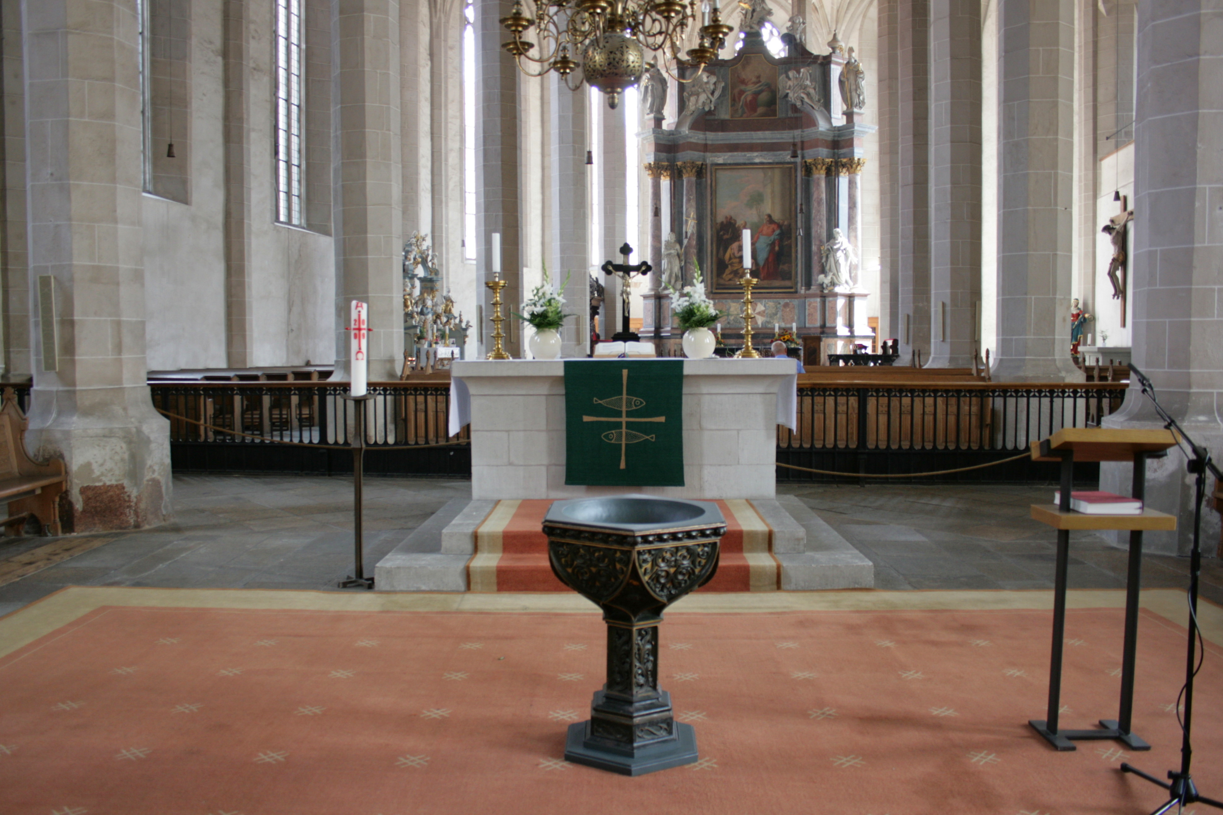 Dom St. Petri in Bautzen, vorne der evangelische Altar, hinter dem Zaun der katholische Teil Hornjoserbsce: Tachantska cyrkej swj. Pětra w Budyšinje; prědku ewangelski wołtar, za płotom katolski dźěl.